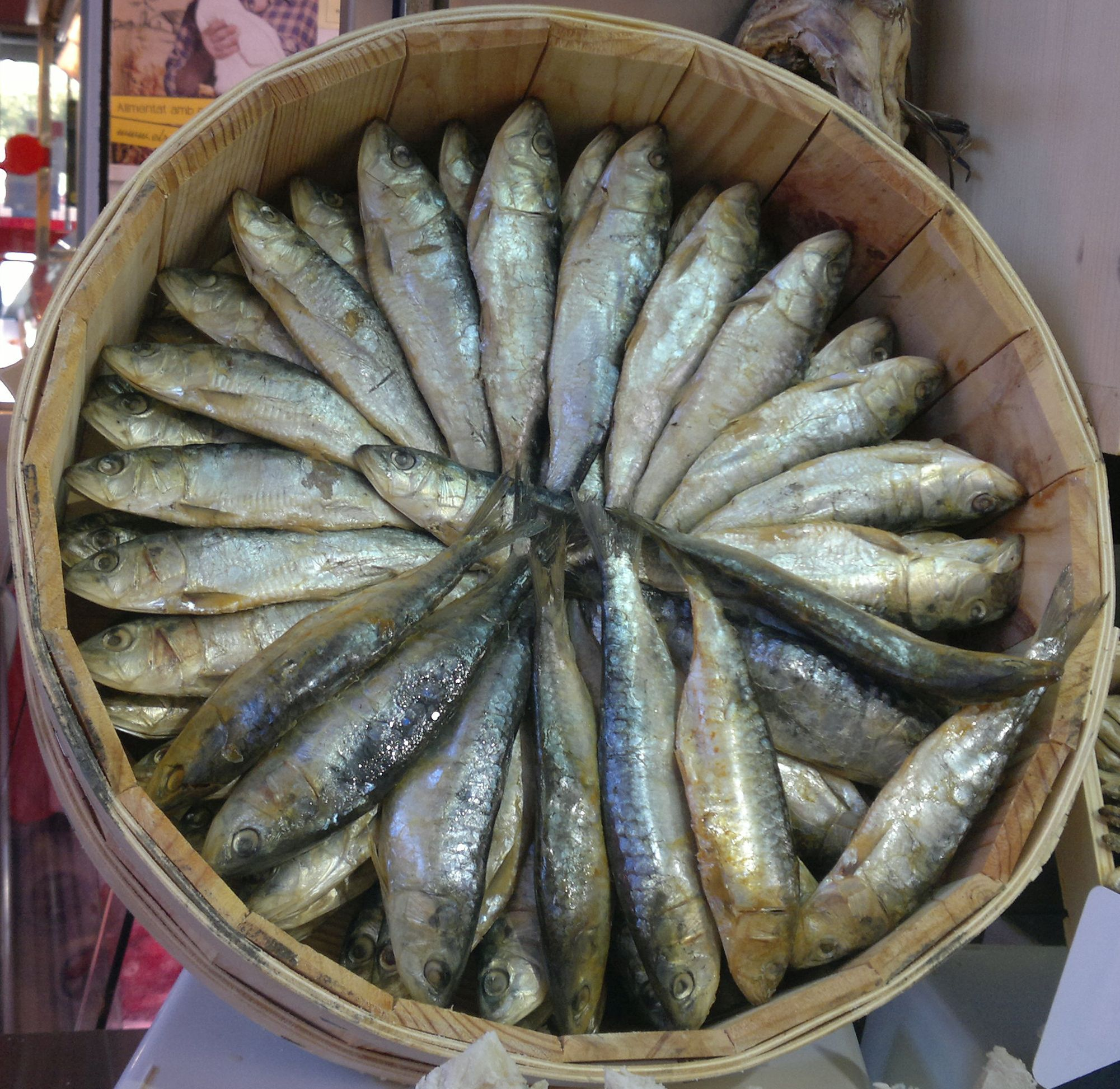 Capsa d'arengades